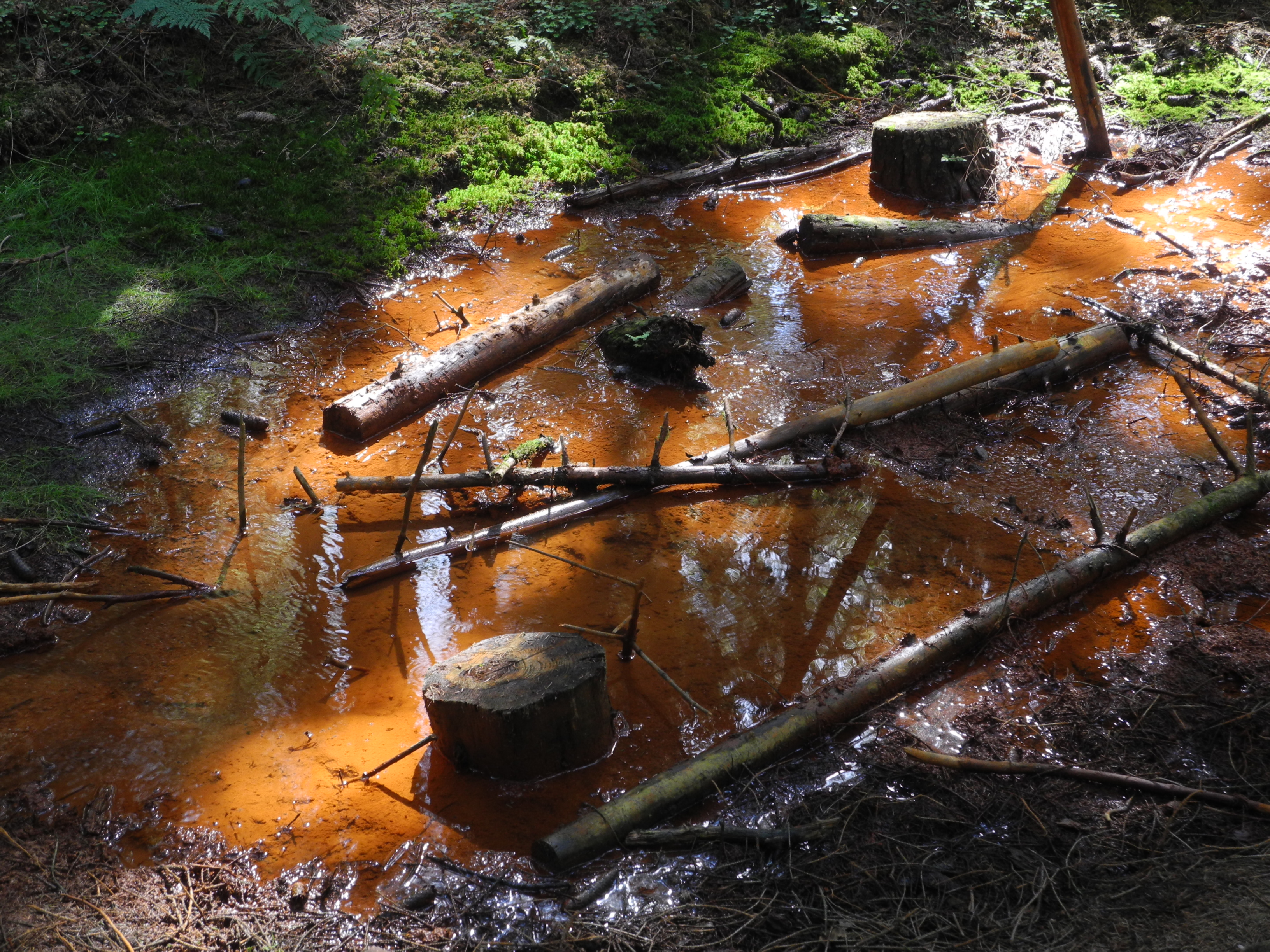 Rote Niestequelle, am Oberlauf der Nieste, nördlich von Großalmerode, Hessen, Deutschland.